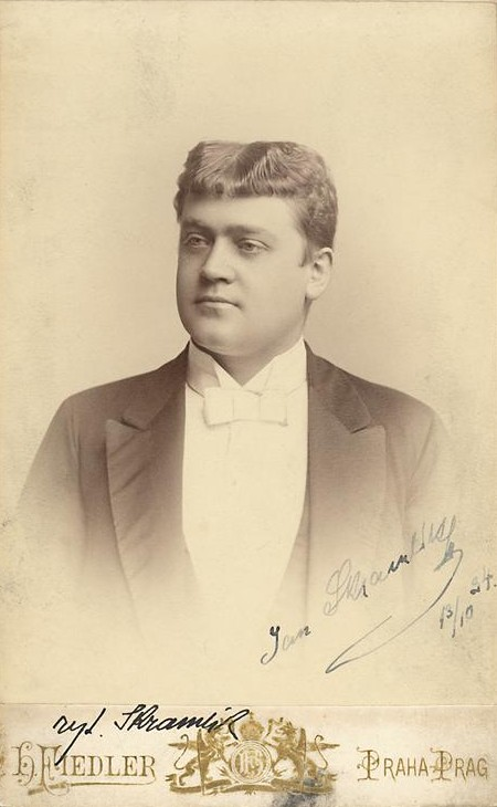 Jan Skramlík (1860-1936)